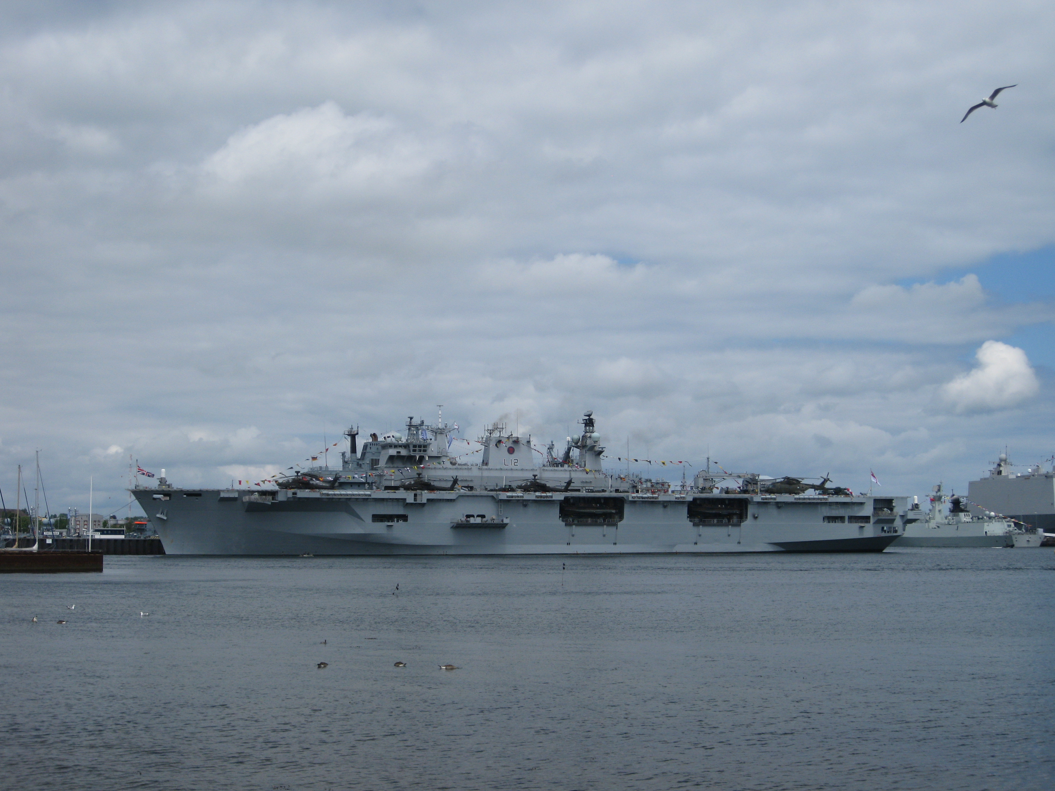 HMS Ocean (L12) in Kiel